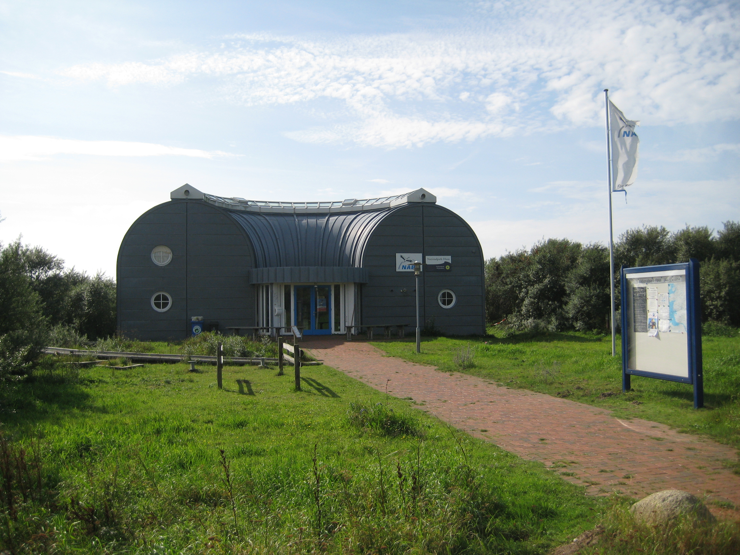 Naturschutzzentrum im Speicherkoog Dithmarschen